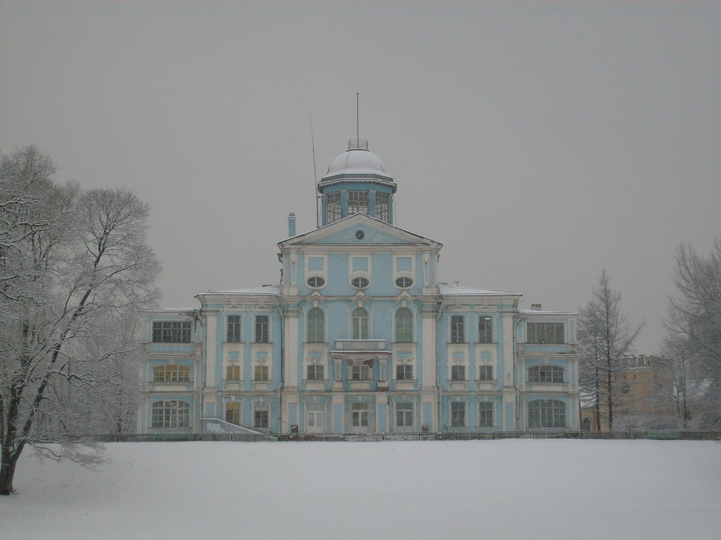 Петергофское шоссе. Новознаменка. Дворец графа Воронцова. Построен в 1750-х годах Джузеппе Трезини